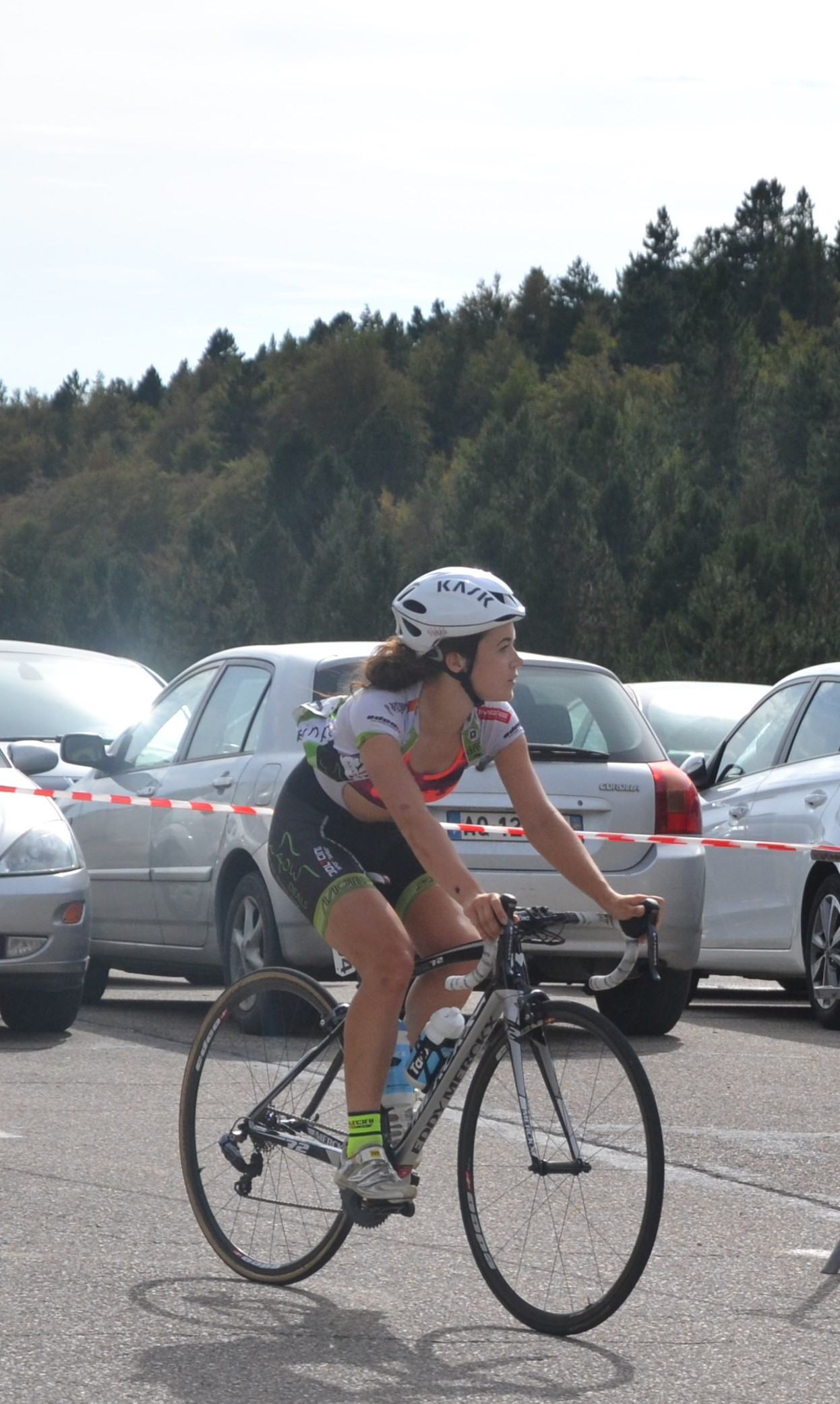 Au chalet Reynard, lors de la 3ème étape du Tour féminin international de l'Ardèche 2016